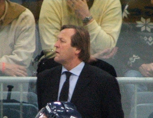 Erich Kühnhackl